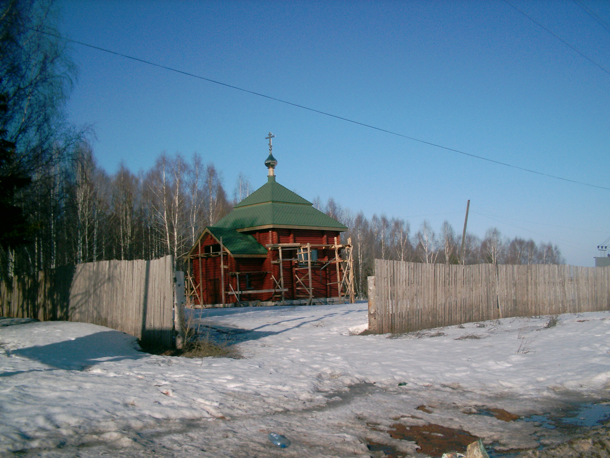 Строящеяся церковь Прокопия Вятского, Нововятский район, г. Киров